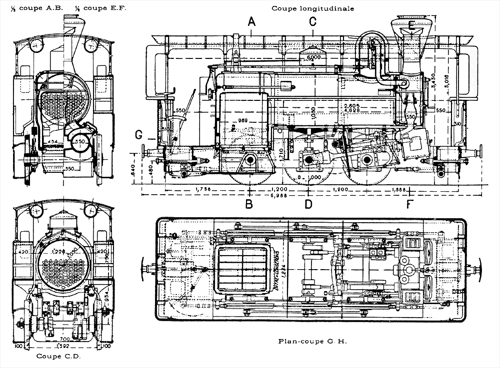 Locomotive Tubize de 25 tonnes livrée en 1894 pour le tramway Paris_Arpajon. Elle desservant notamment les Halles en y acheminant les primeurs.